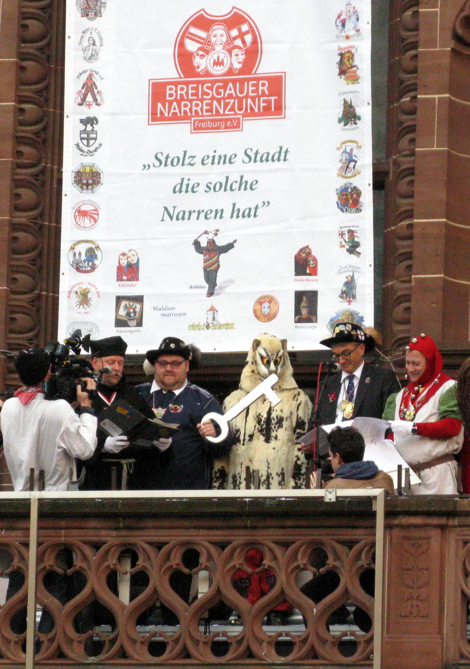 Sturm aufs Rathaus am Schmotzigen Donnerstag in Freiburg. Oberbürgermeister Dieter Salomon übergibt den Schlüssel an Oberzunftmeister Matthias Moser und Münsternarr Markus J. Weber.